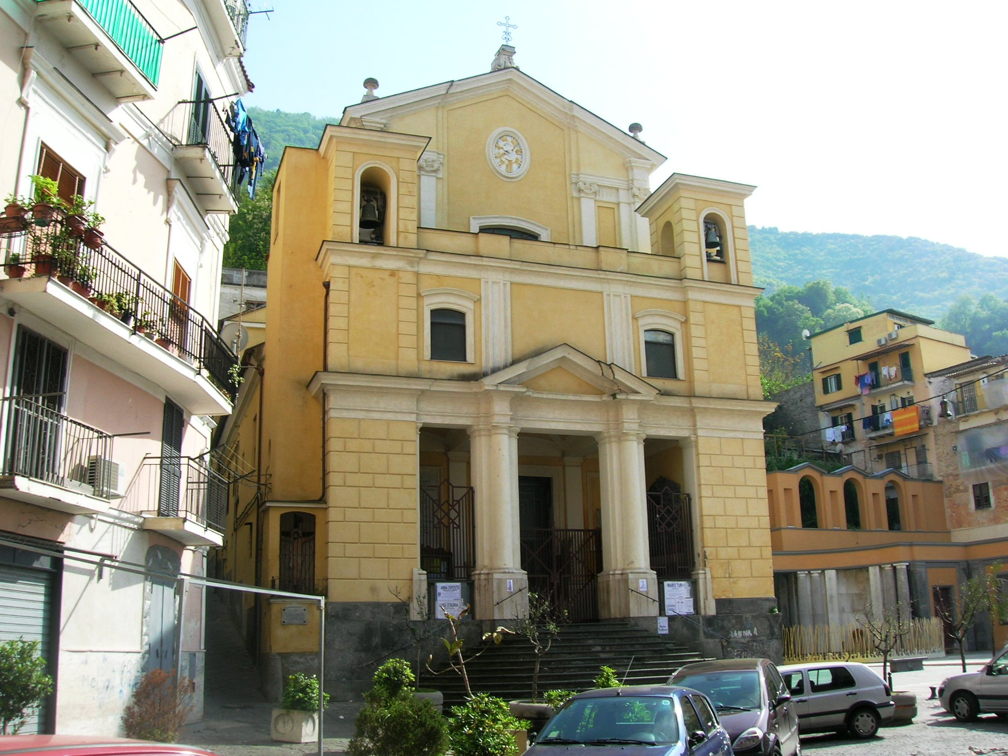 La facciata esterna della chiesa dello Spirito Santo di Castellammare di Stabia